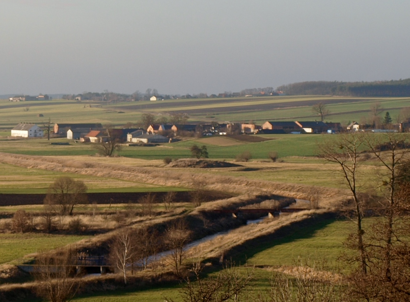 Wieś Szczodrochowo i grodzisko stożkowe nad kanałem Obry.